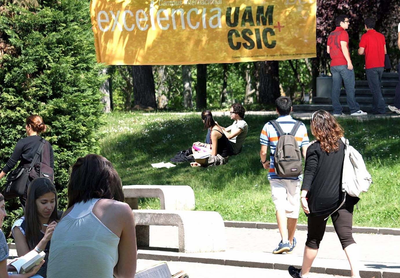 Campus UAM